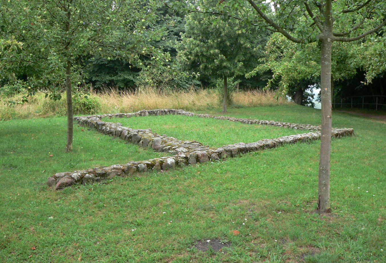 Fundamente auf dem Plateau der Weinbergsburg